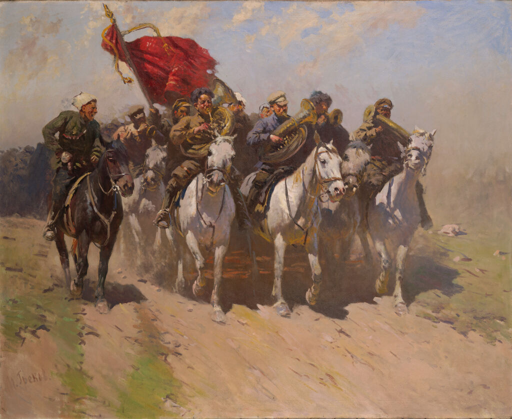 Трубачи Первой Конной армии. Trumpeters of 1st Cavalry